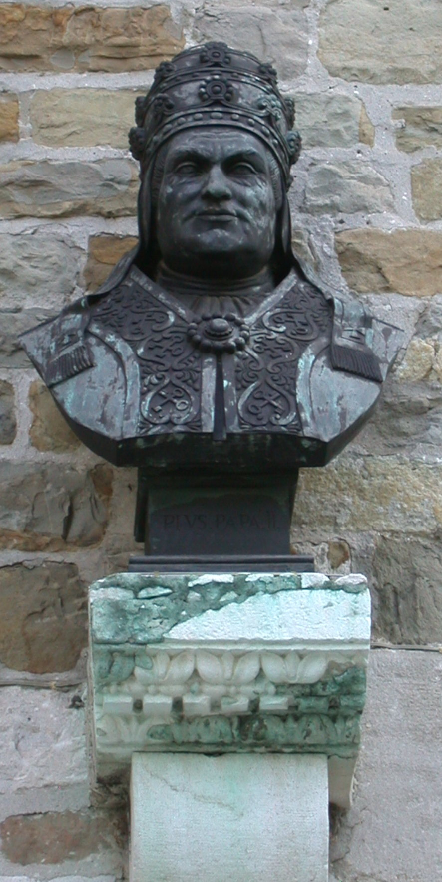 La busta di Papa Pio II. alla facciata della Cattedrale di San Giusta a Trieste.